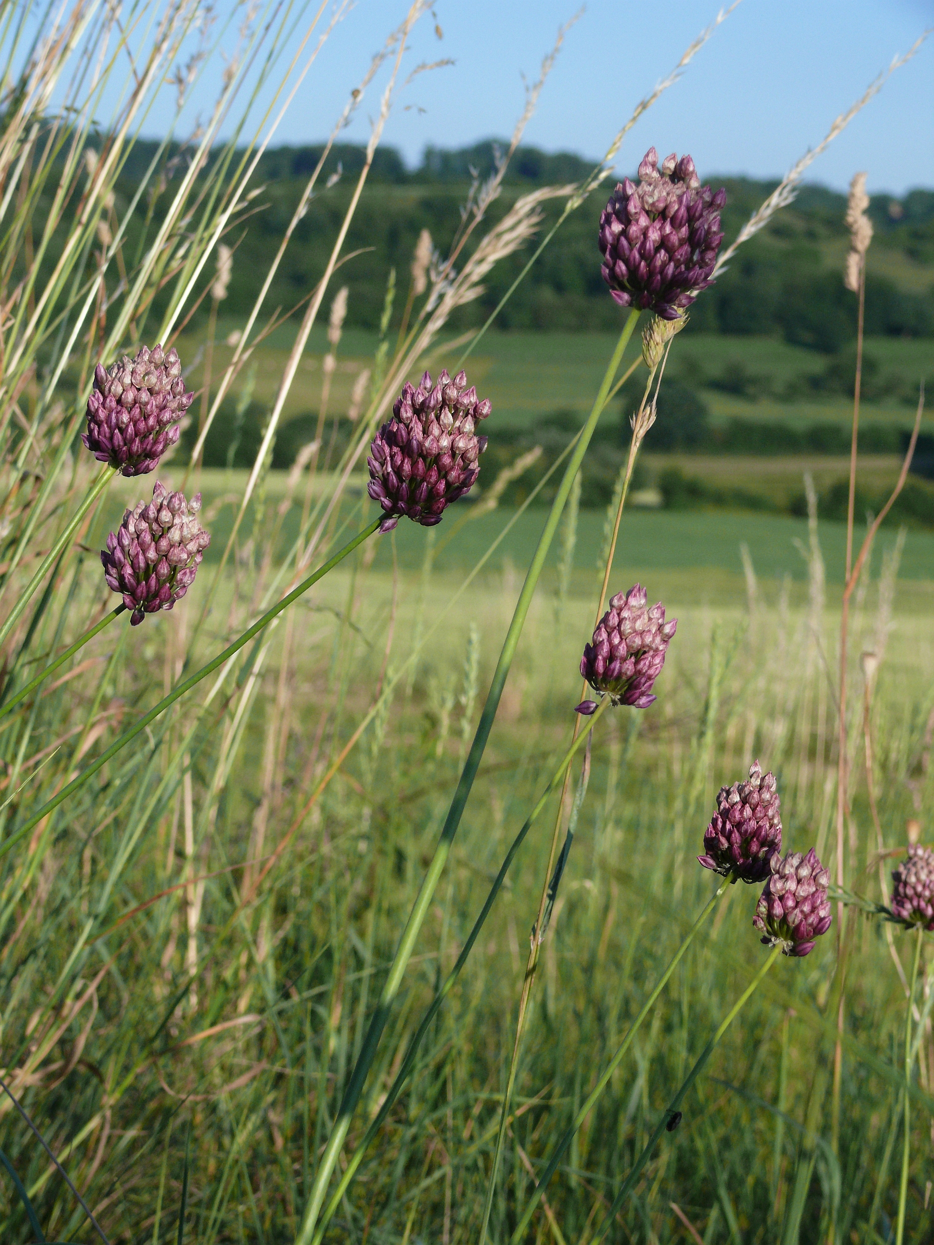 Allium rotundum, Hohenlohe, Deutschland